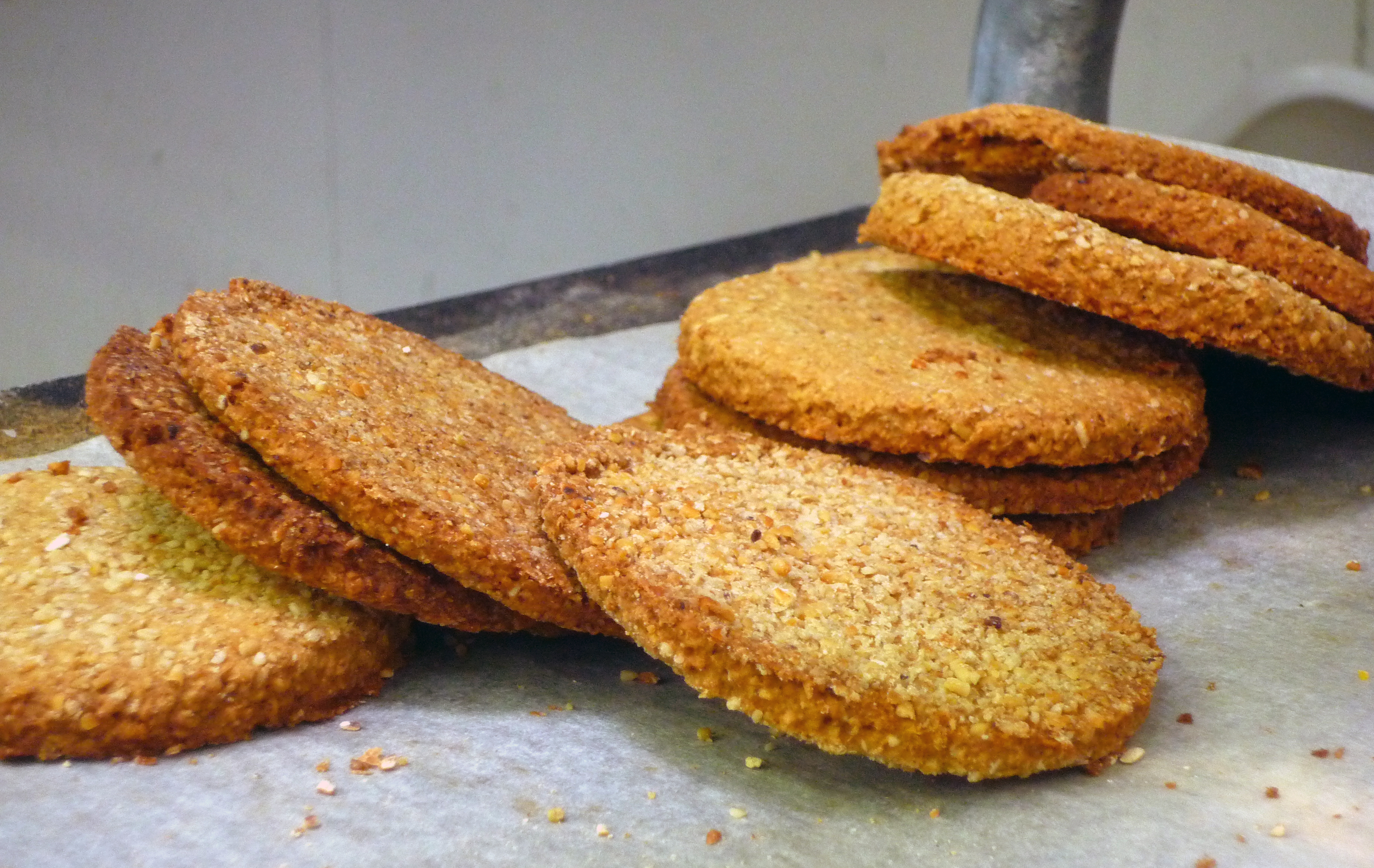 Oatcakes